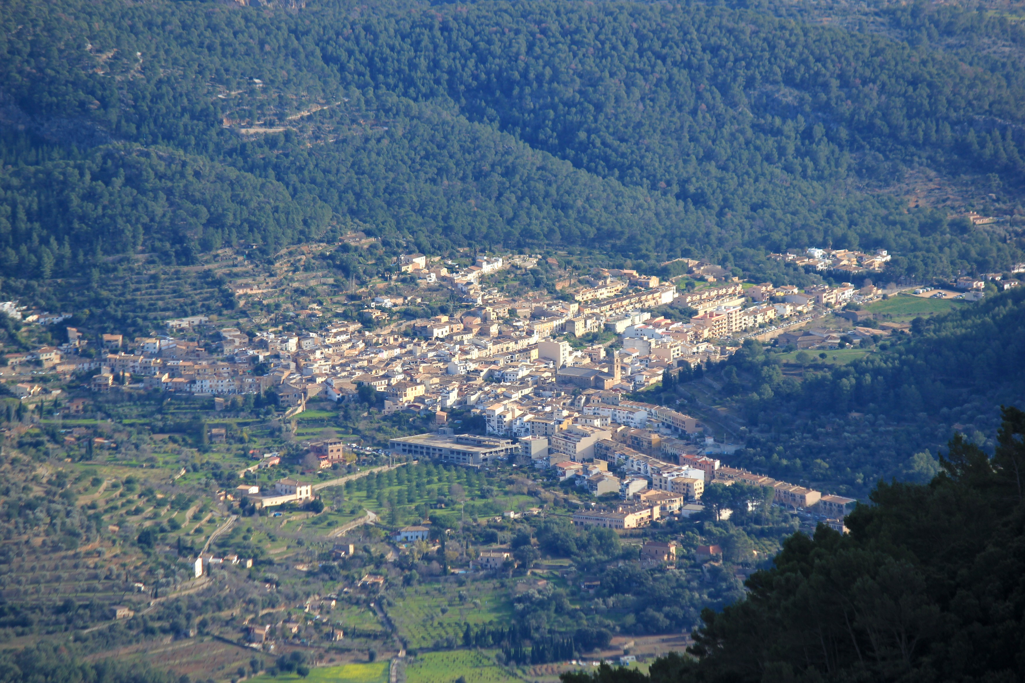 Blick vom Puig des Teix auf Bunyola.